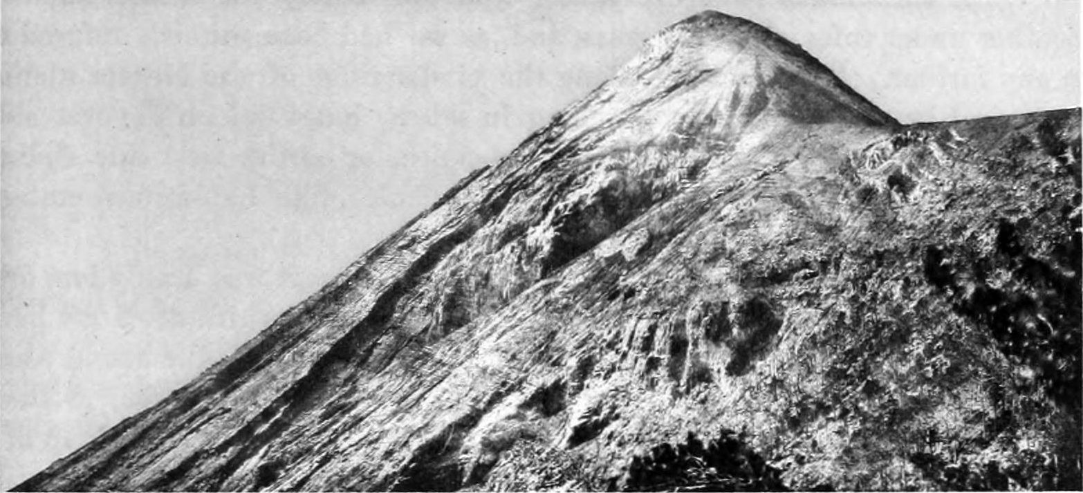 Volcán de Fuego desde la meseta que lo divide del Volcán Acatenango..